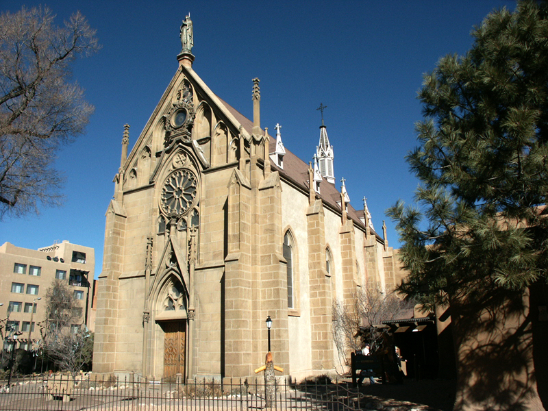 Loretto Chapel in Santa Fe, NM